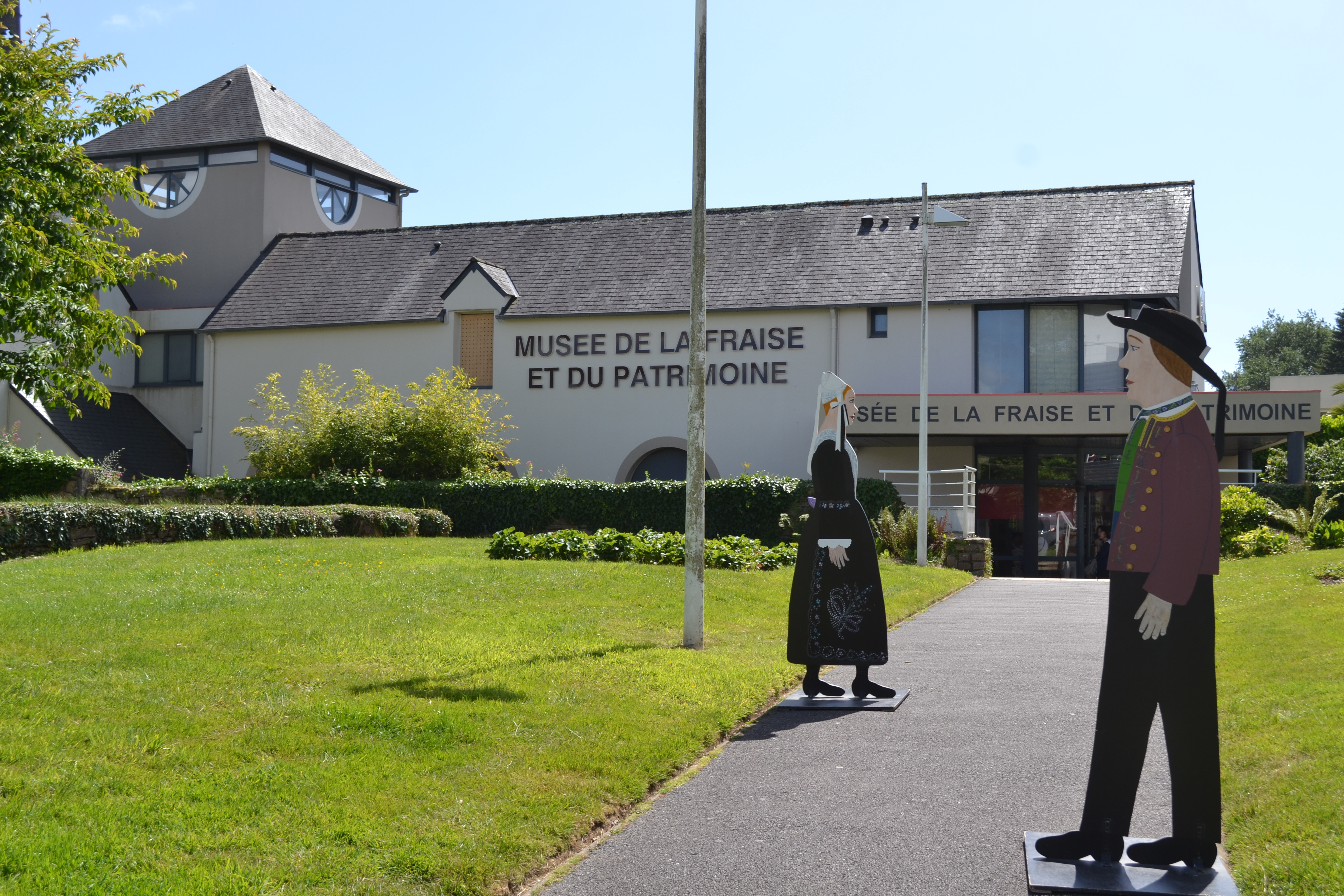 Le Musée de la Fraise et du Patrimoine à Plougastel-Daoulas.